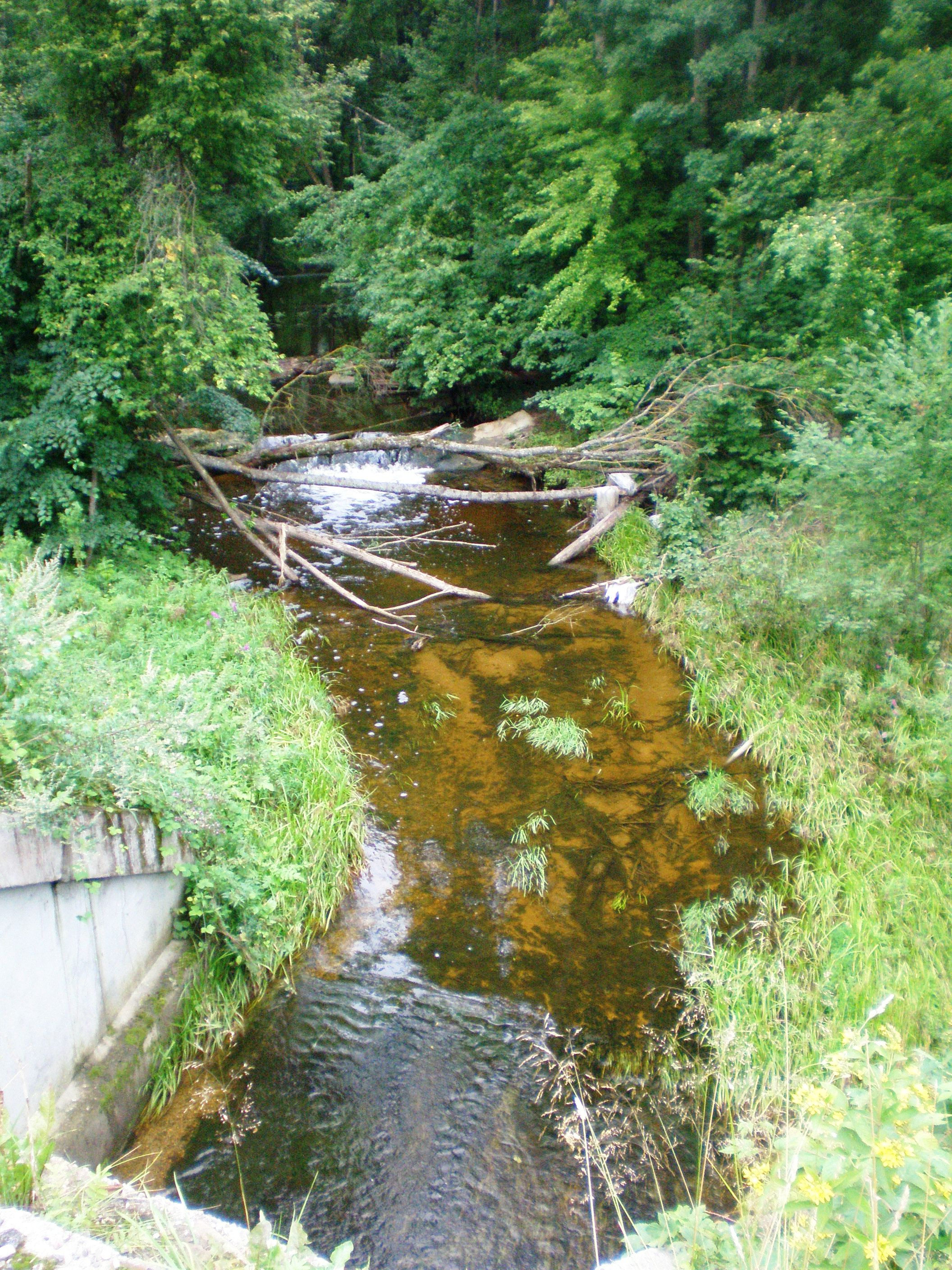 Aluona river